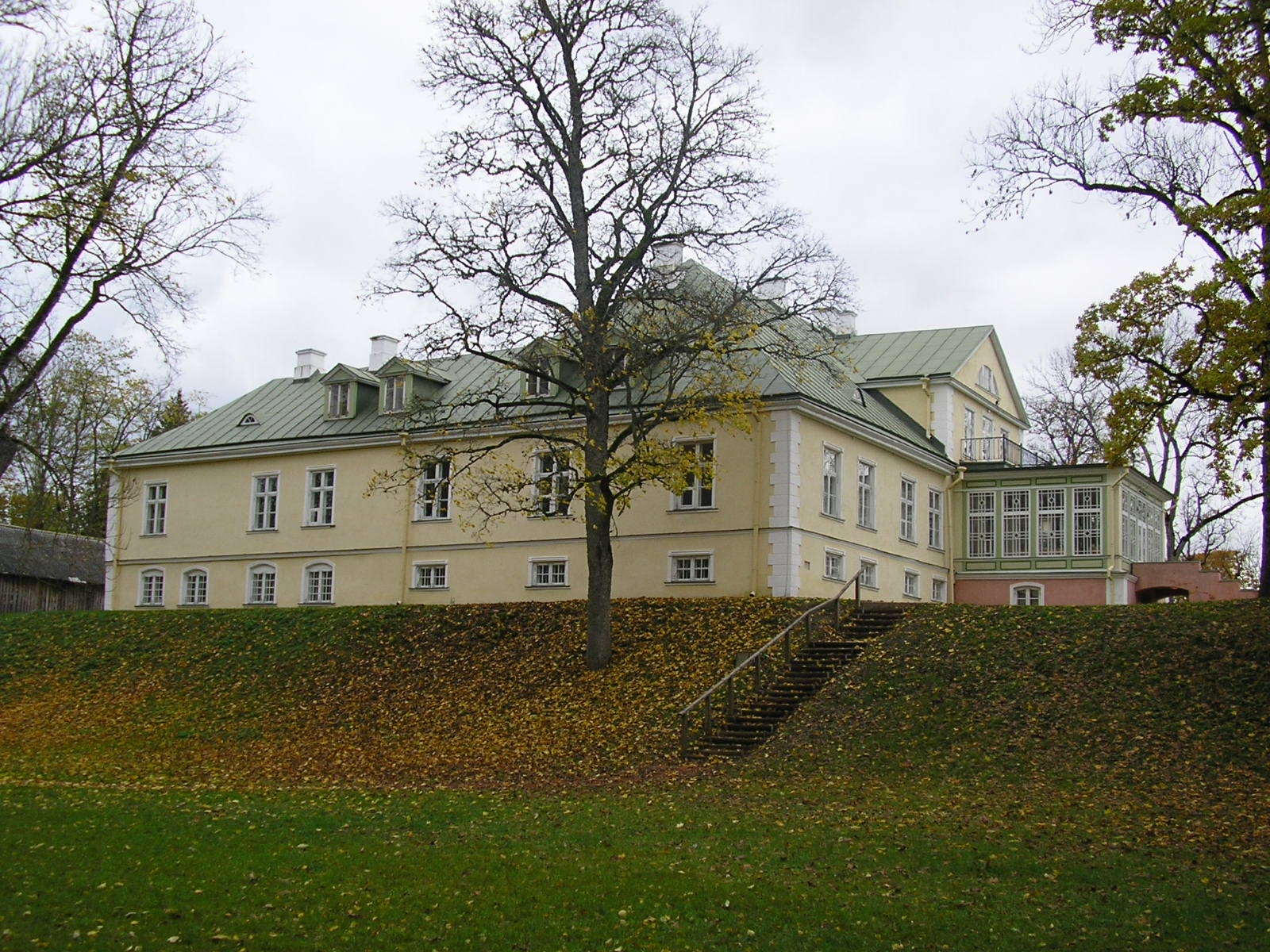 Albu mõisa peahoone